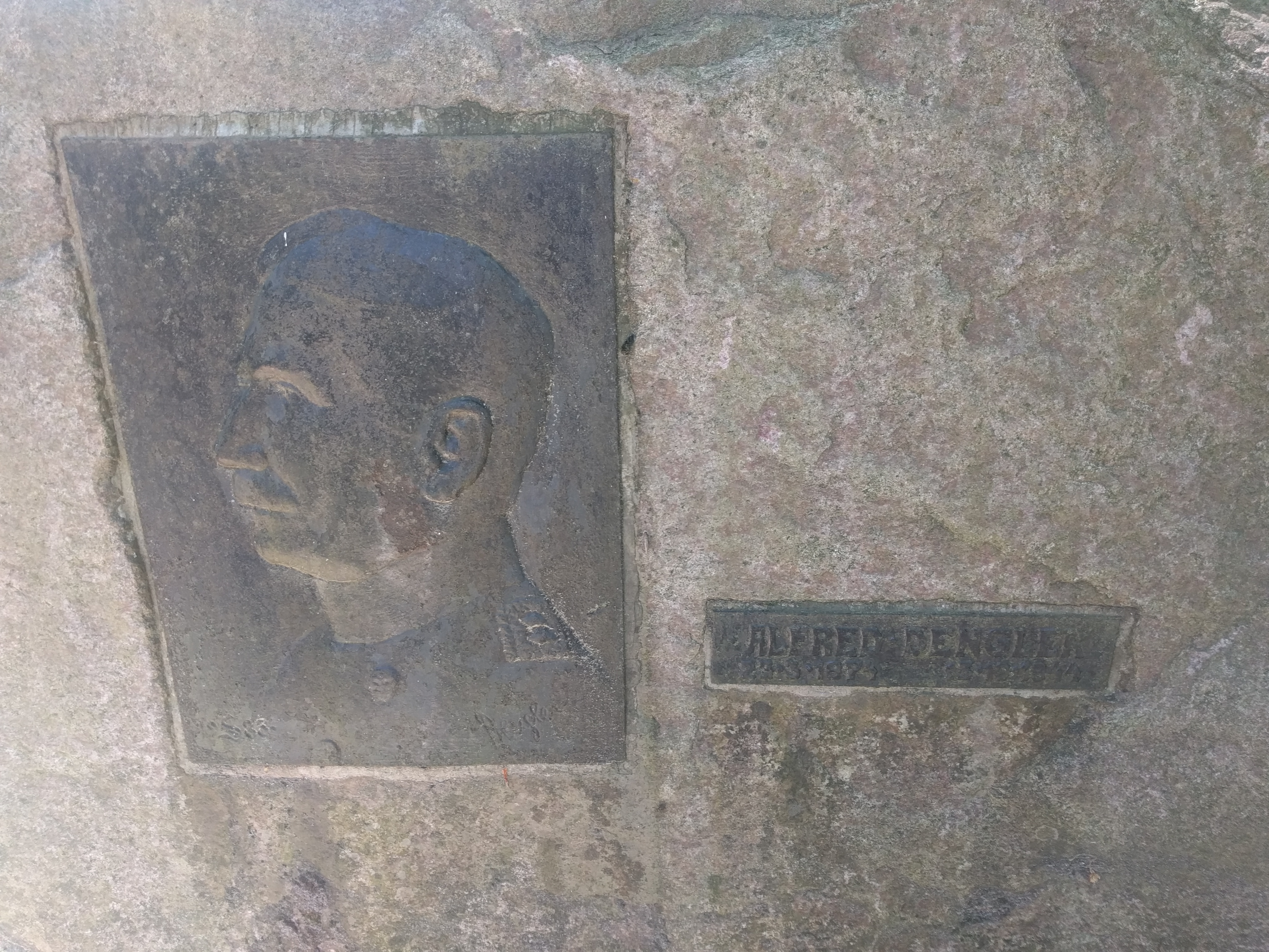 Nahaufnahme Gedenktafel Alfred Dengler (bei Chorin).